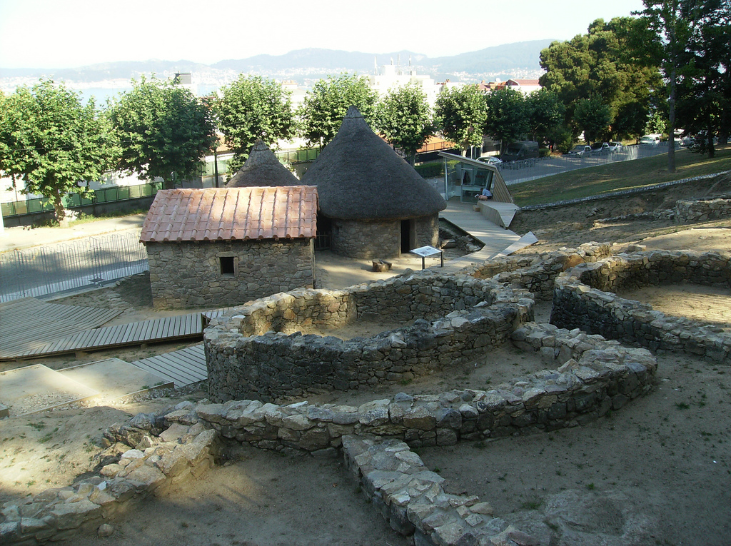 Restos arqueológicos de O Castro, con las tres viviendas recreadas en segundo plano.